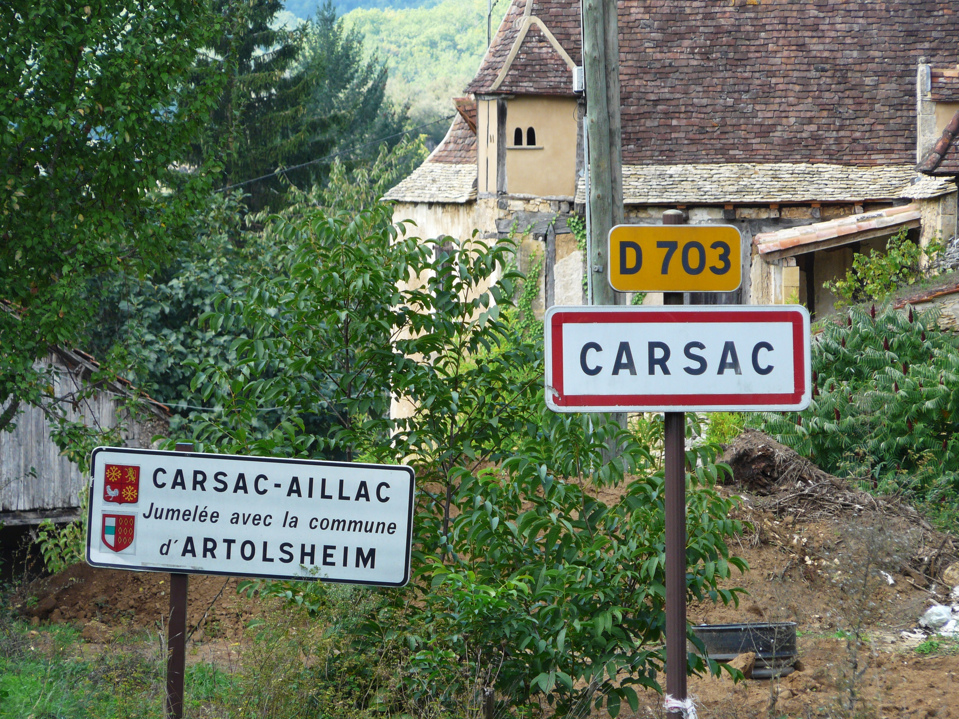 Panneau de jumelage de Carsac-Aillac, Dordogne, France.